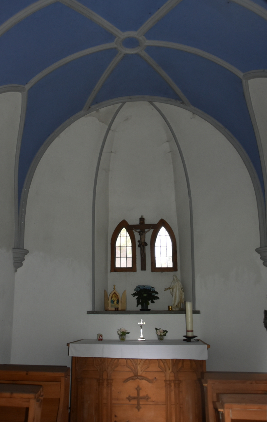 Blick durch den Eingang auf den Altar der Maxensruhkapelle in Immenstadt